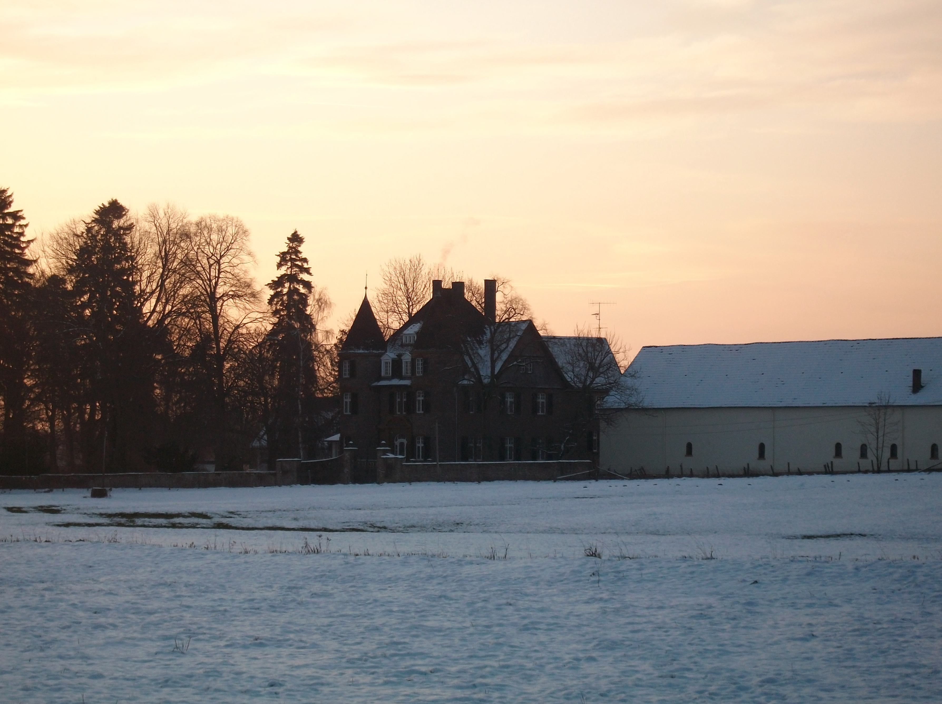 Kloster und Gut Glindfeld, Villa "Hohe Mirke" auch "Burg" genannt, Medebach (Germany)